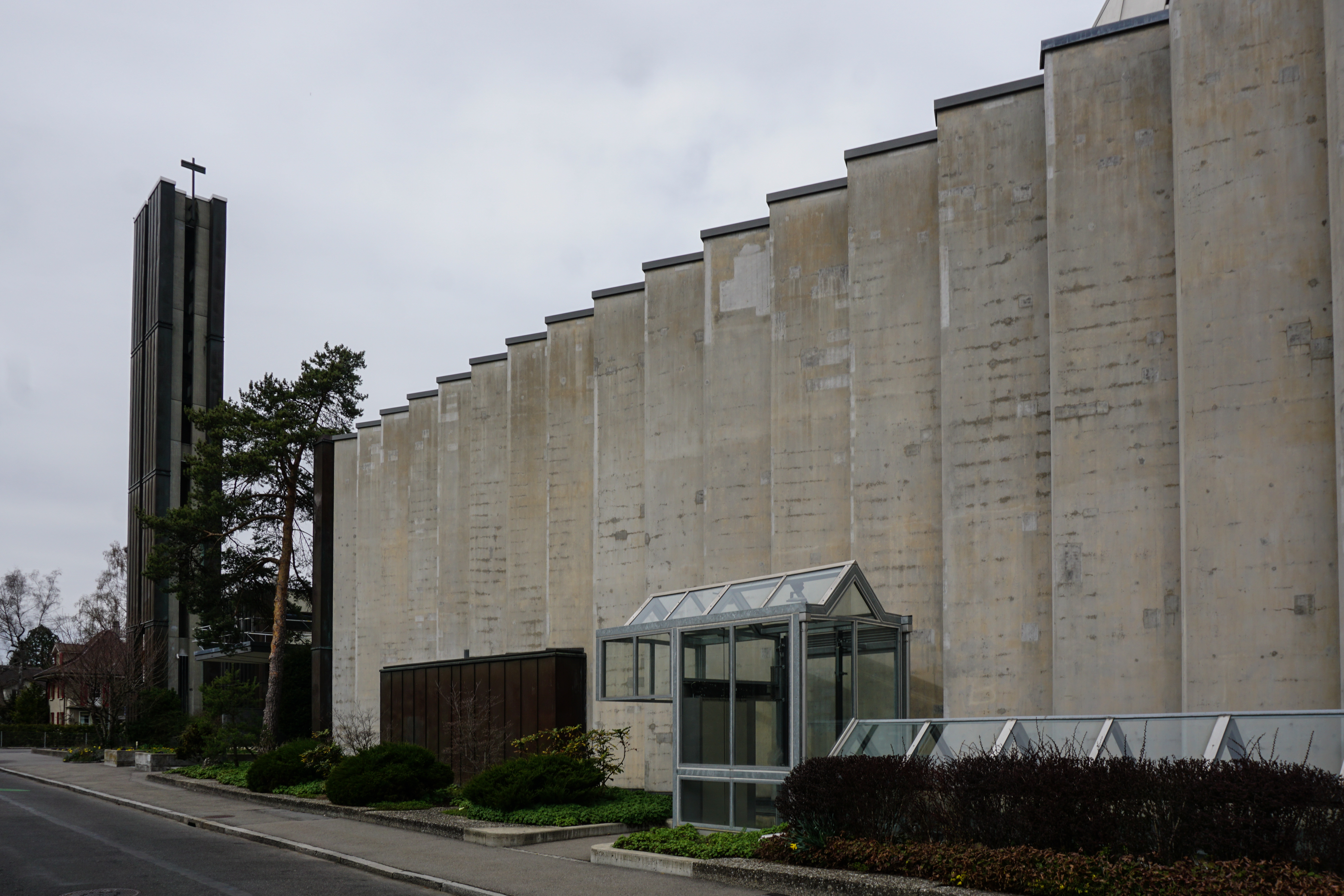 Römisch-katholische Kirche St. Antonius von Padua, Bern-Bümpliz, Südfassade